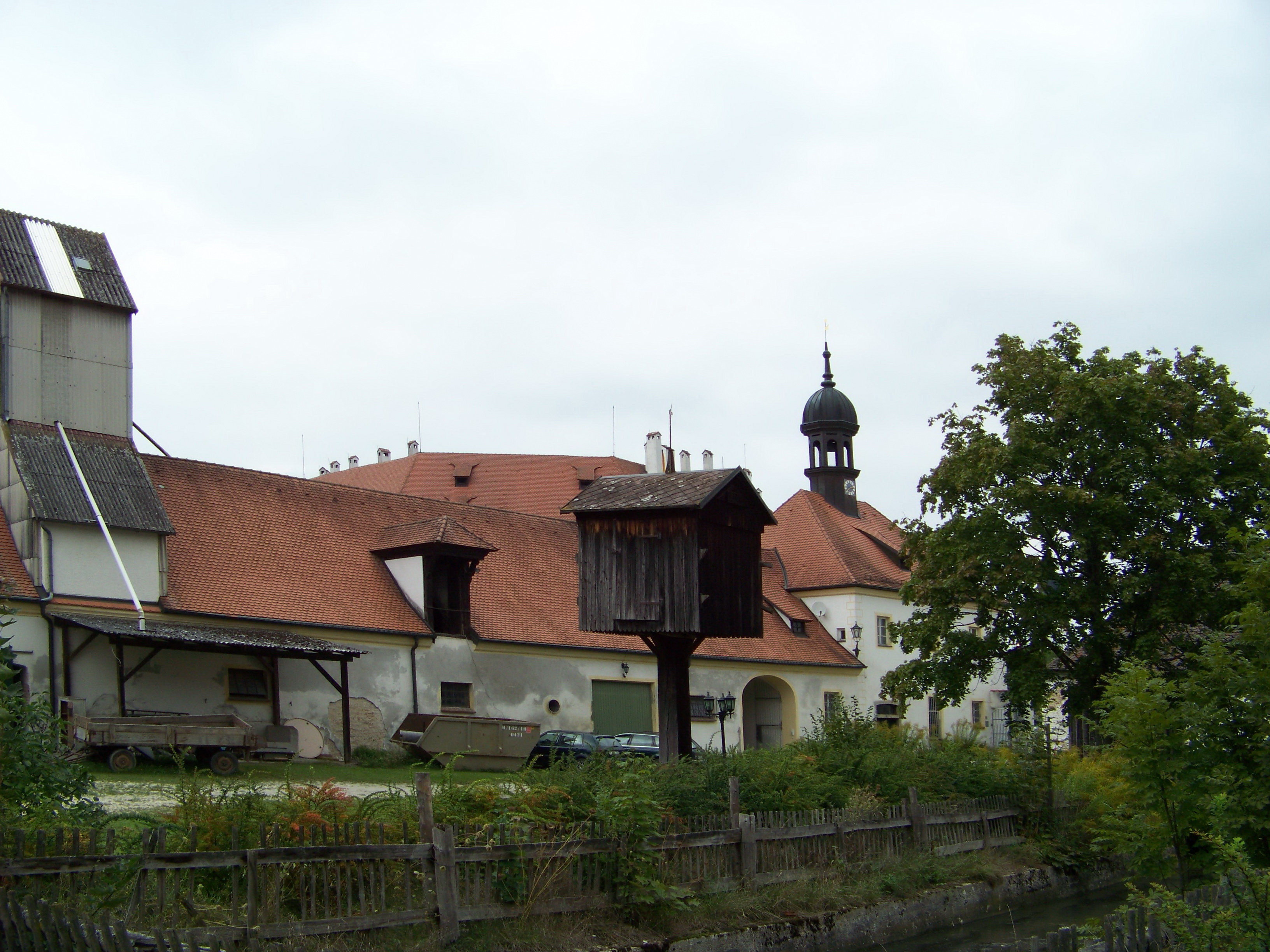 Sünching, Schlossökonomie, eingeschossige Dreiflügelanlage mit Walmdächern, zweigeschossigen Pavillons als Kopfbauten, Dachreiter und Hoftoren, Mitte 18.